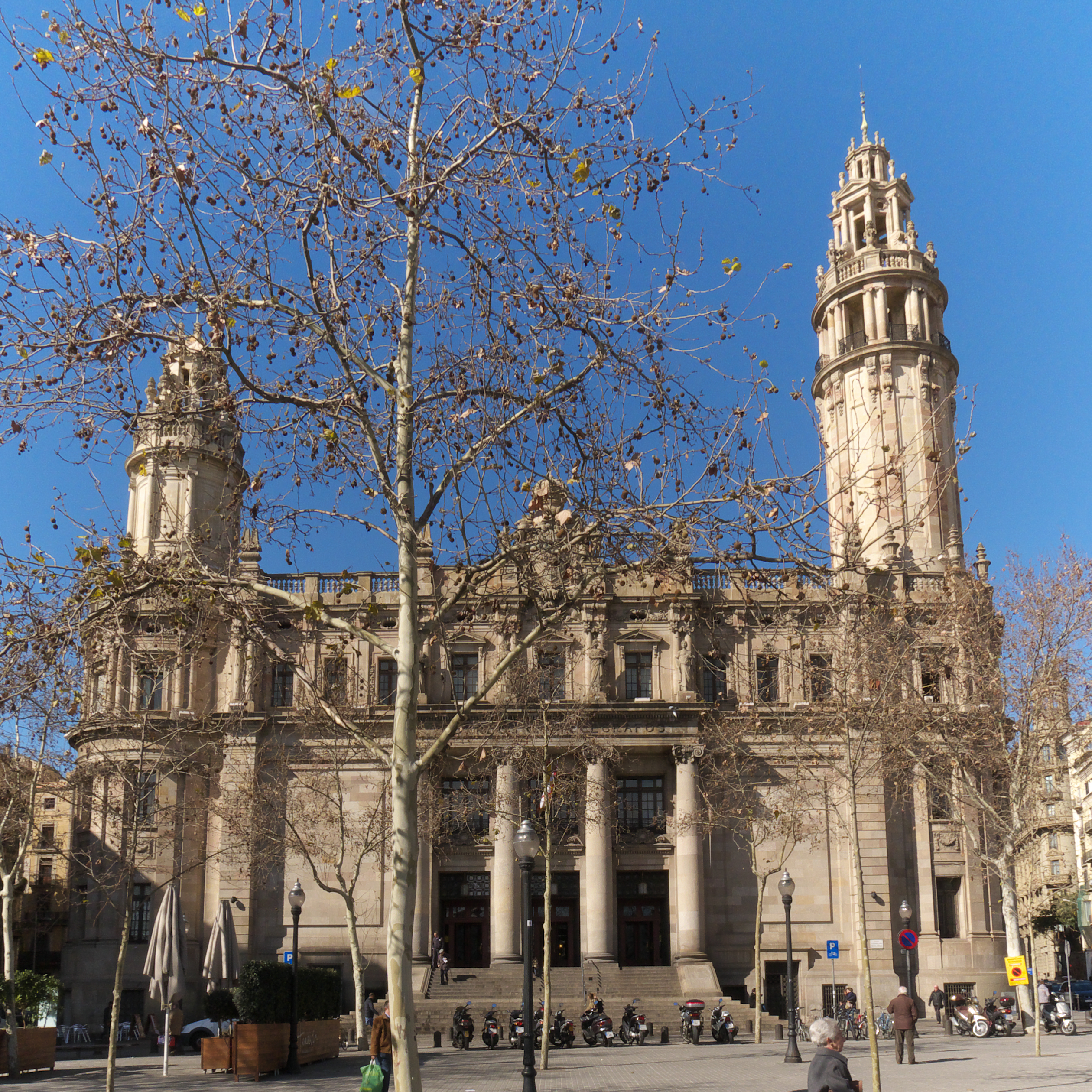 Obra de José Goday Casals y Jaime Torres Grau (1927)